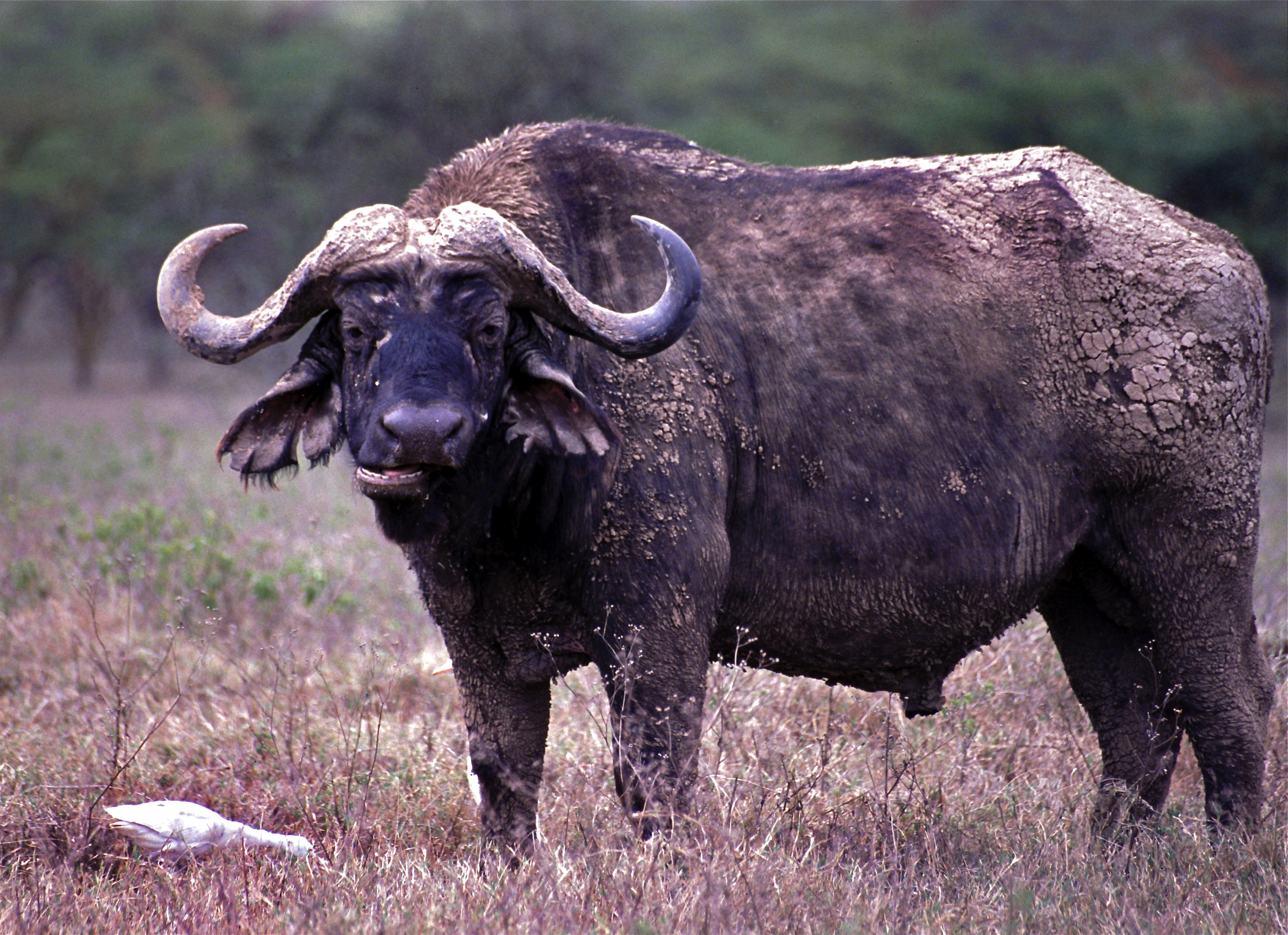 Lake Nakuru NP, KENYA Scanned slide from 2004